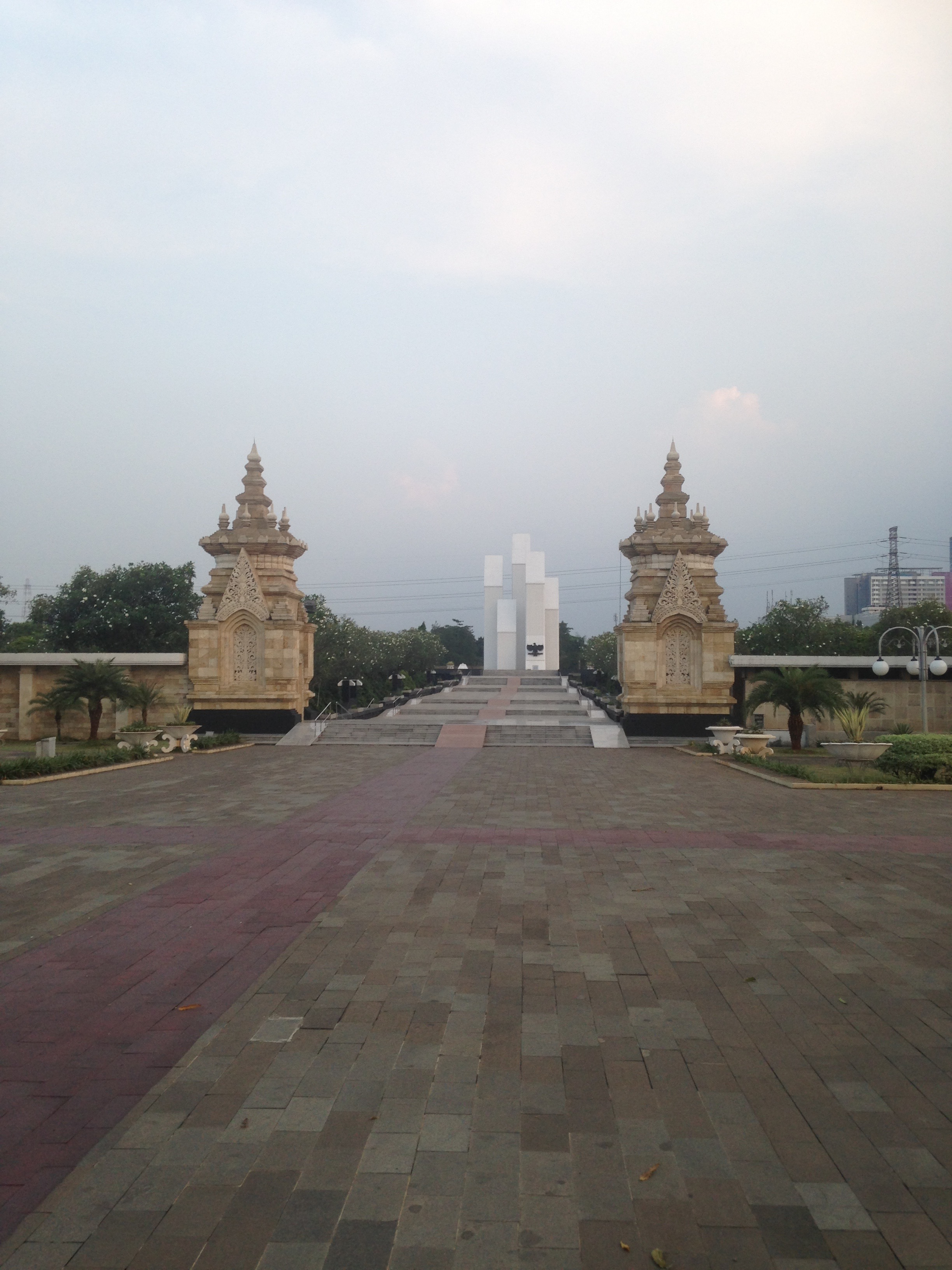 Cmentarz bohaterow narodowych indonezja